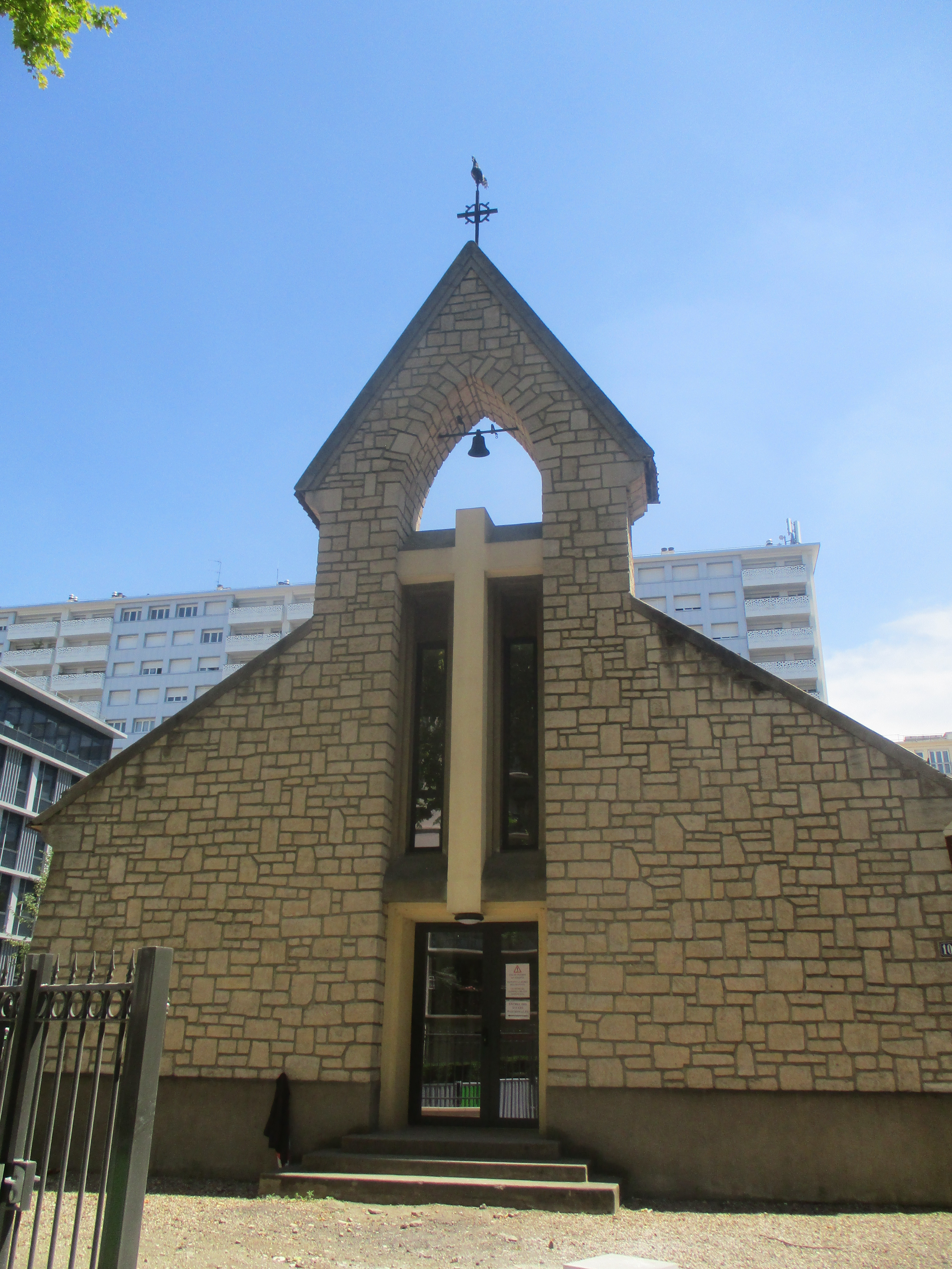 Façade de la chapelle Saint-Raymond de Montrouge.